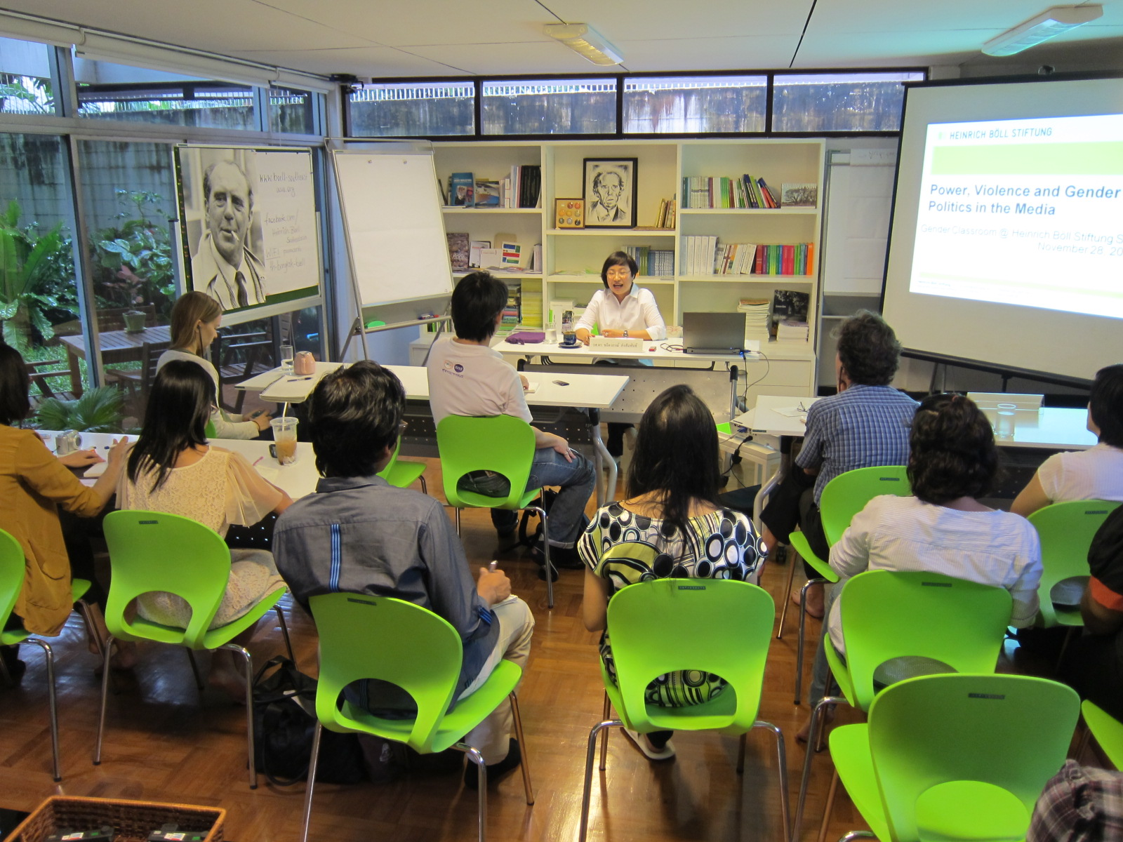 Seminar im Büro Thailand der Heinrich-Böll-Stiftung in Bangkok